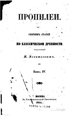 Обложка сборника статей по классической древности «Пропилеи»